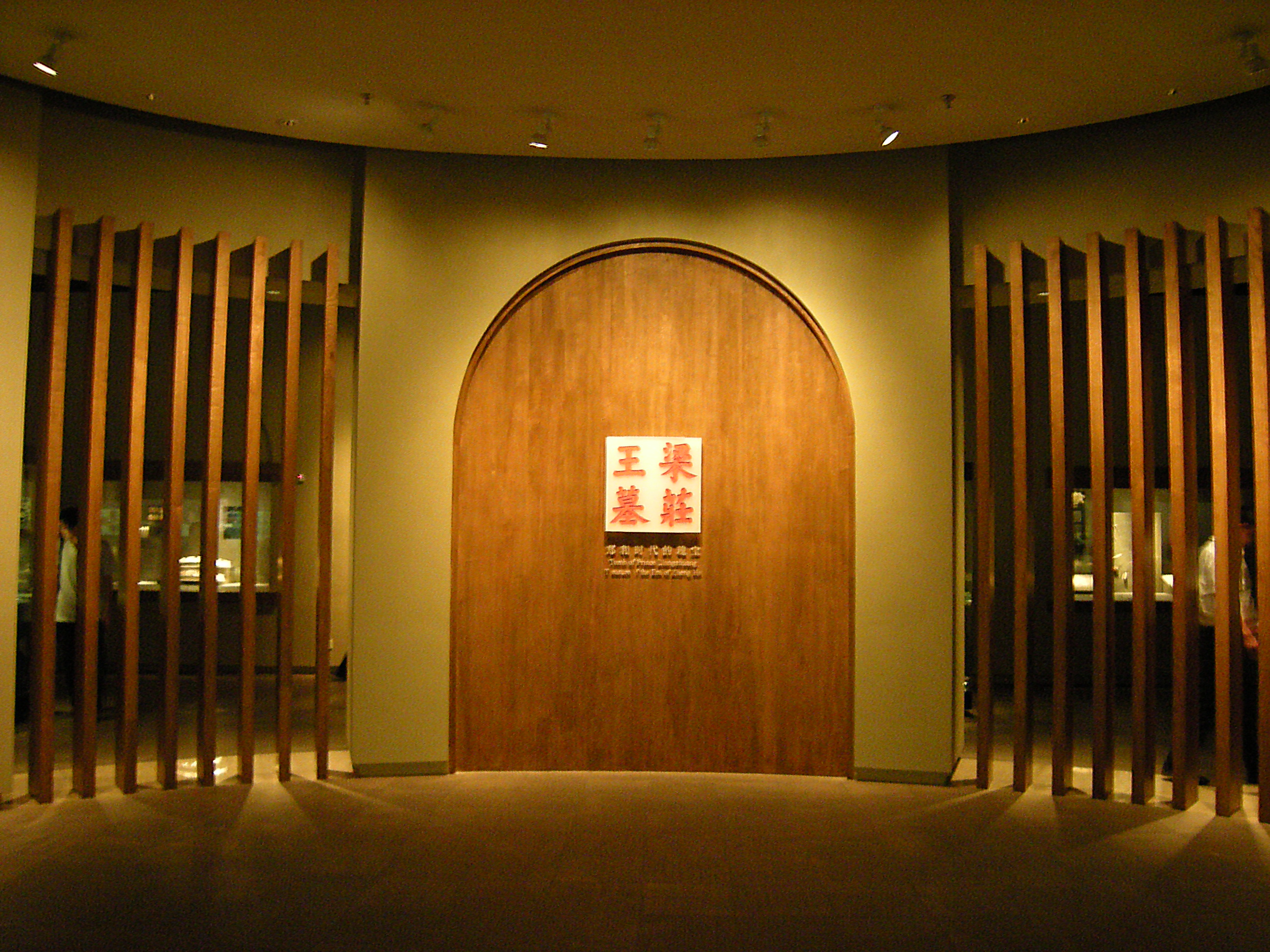 Tomb of Prince Liangzhuang 位于湖北省武汉市湖北省博物馆的明代梁庄王墓展厅